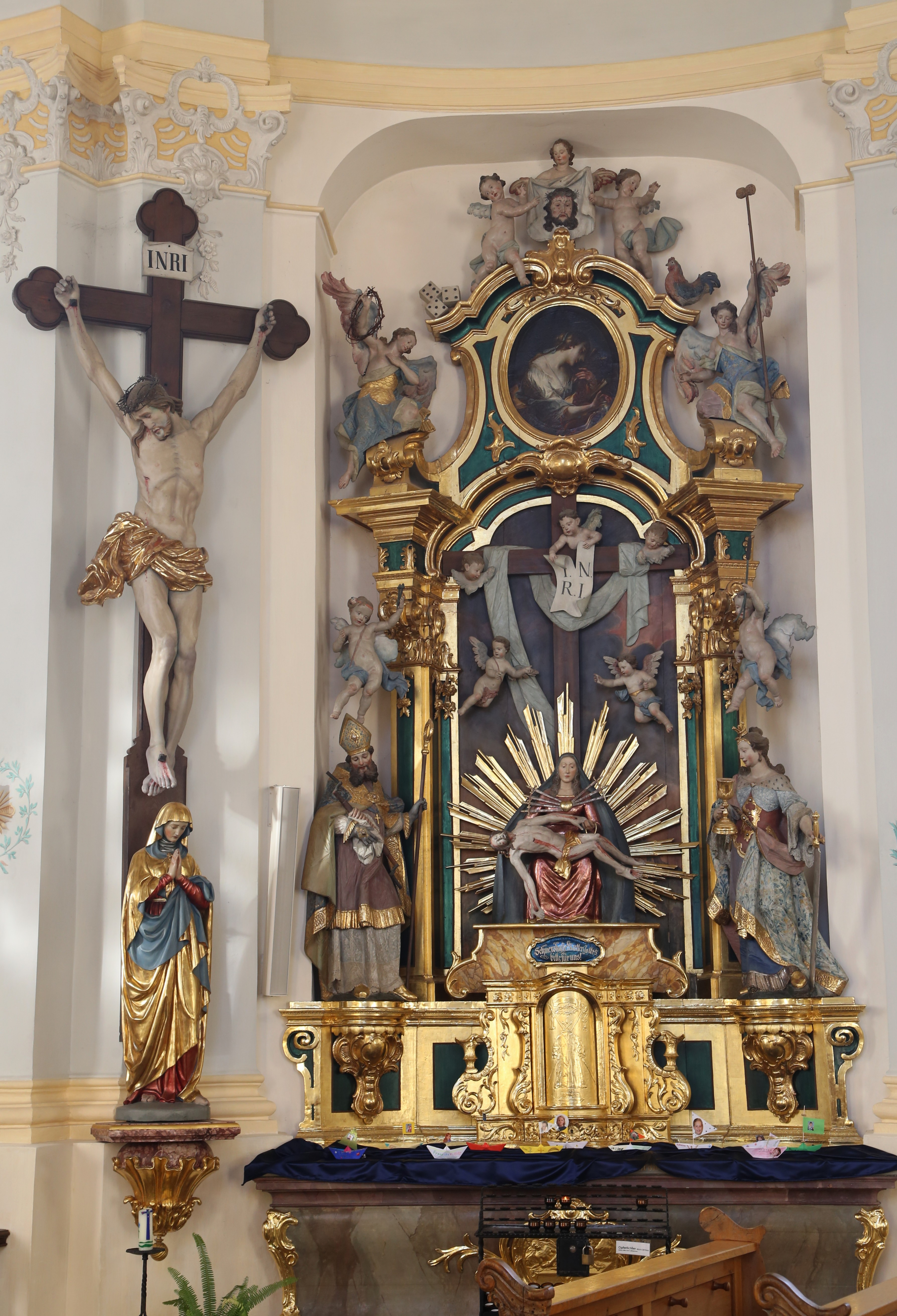 St.-Jakobus-Platz 1, Rohrdorf; Kath. Pfarrkirche St. Jakobus d.Ä., Saalbau mit Satteldach und Nordturm mit Spitzhelm, Turmunterteil spätgotisch, barocker Neubau 1769-73 von Leonhard Matthäus Gießl, 1854-55 Turmoberbau, 1864 neuromanische Vorhalle; mit Ausstattung; Friedhofsummauerung des 17./18. Jh.